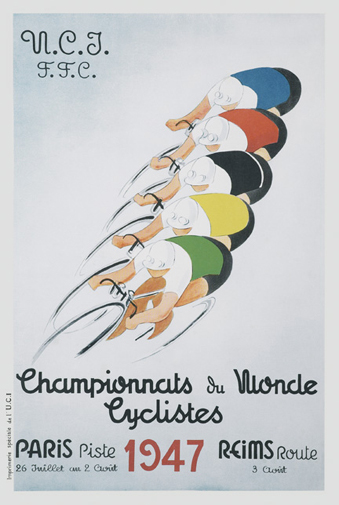 Championnats du monde de cyclisme 1947